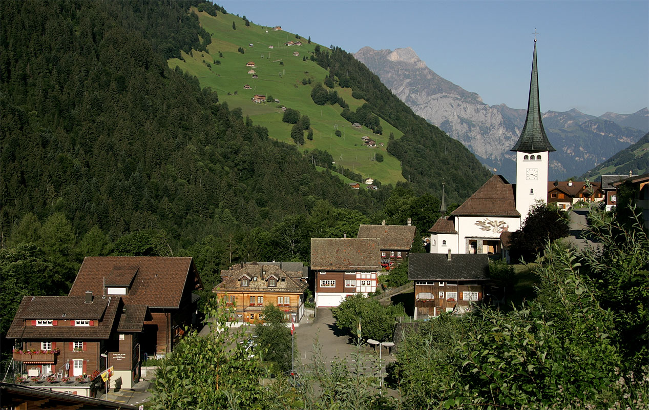 Spiringen